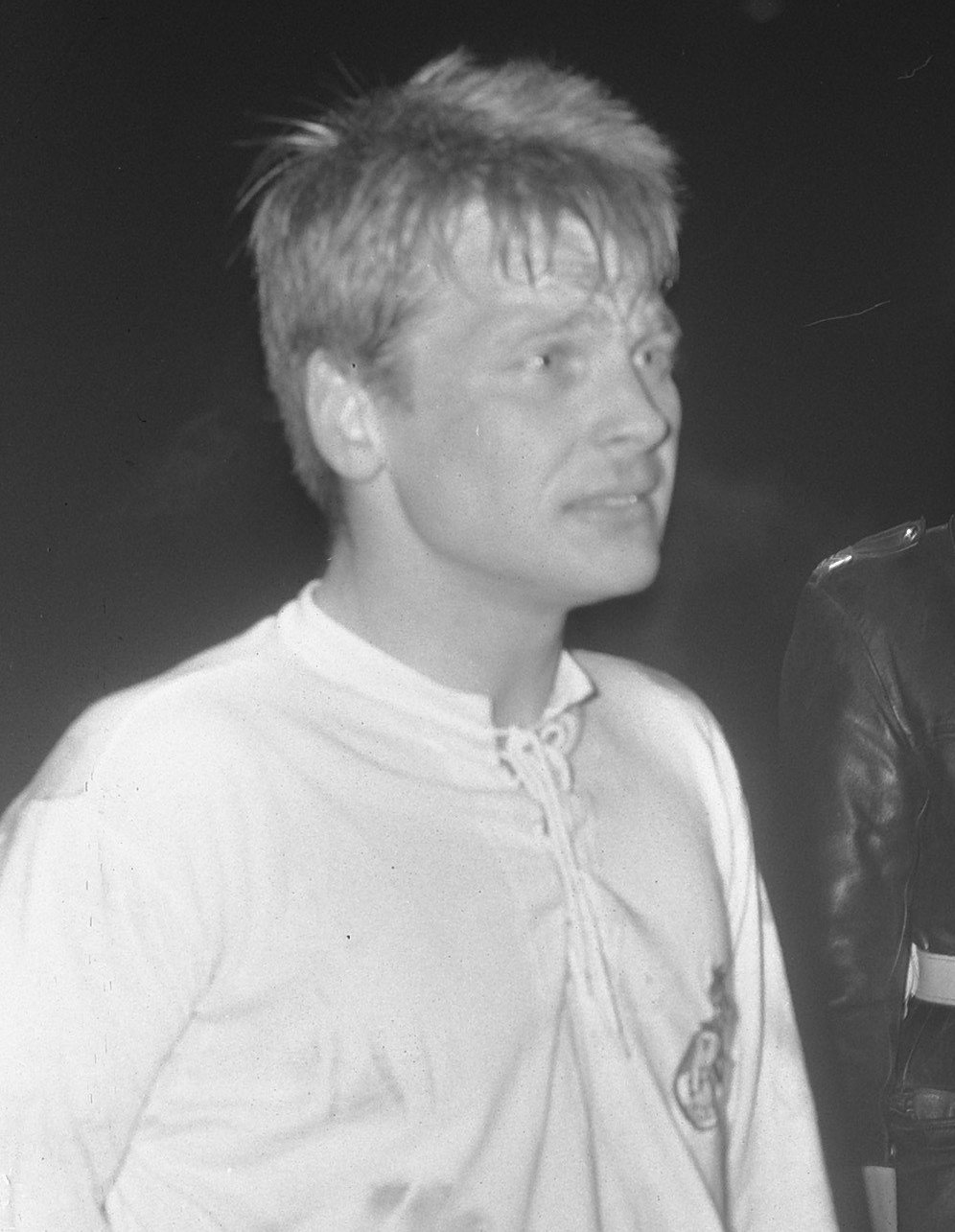 Collectie / Archief : Fotocollectie Anefo Reportage / Serie : [ onbekend ] Beschrijving : FC Koln tegen Liverpool 2-2, in Feyenoordstadion, Duitse speler na de loting Datum : 24 maart 1965 Trefwoorden : sport, voetbal Instellingsnaam : Kuip, De Fotograaf : Koch, Eric / Anefo Auteursrechthebbende : Nationaal Archief Materiaalsoort : Negatief (zwart/wit) Nummer archiefinventaris : bekijk toegang 2.24.01.03 Bestanddeelnummer : 917-5708